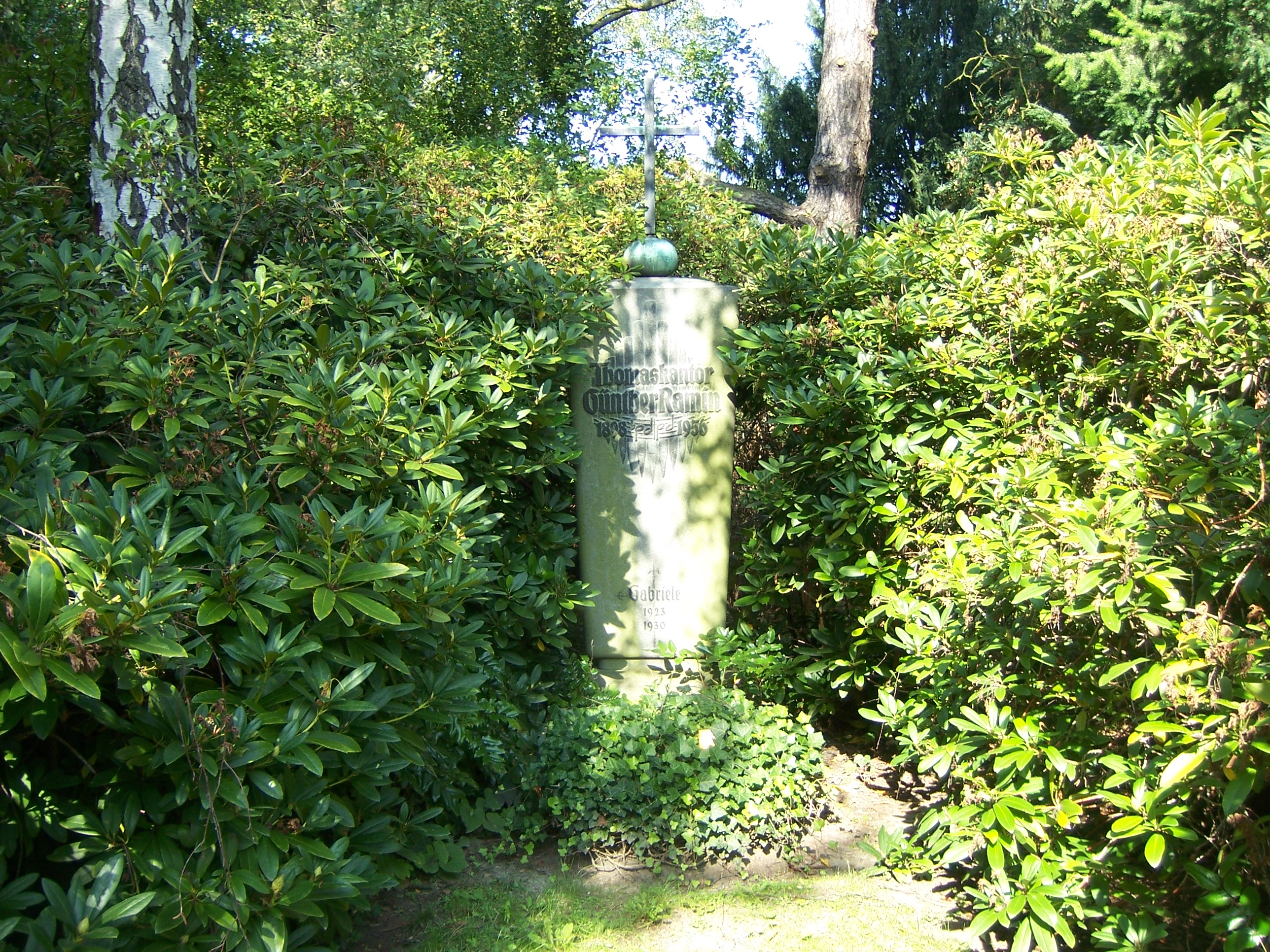 Grabstätte Thomaskantor Günther Ramin und Angehörige